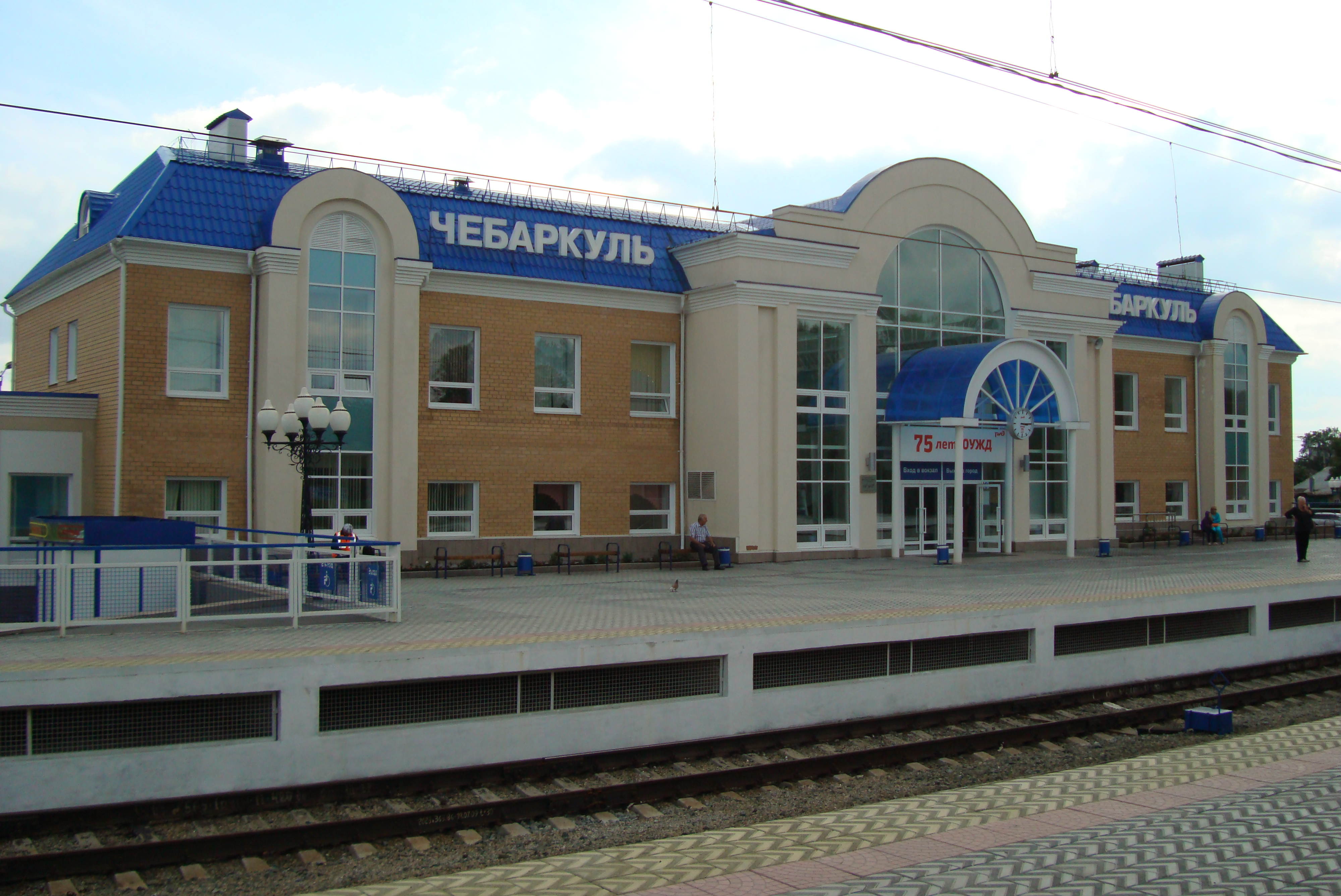 Čebarkulské nádraží